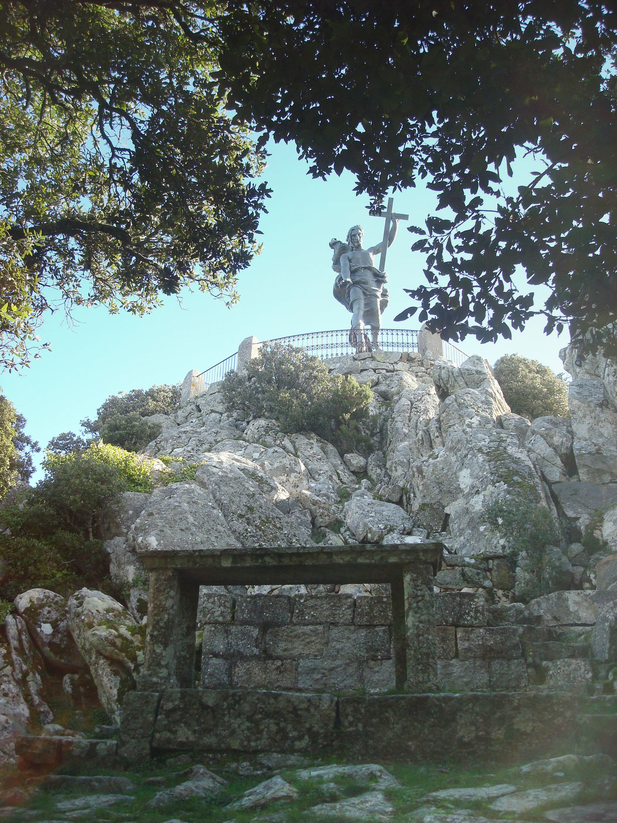 Statua del Redentore sul monte Ortobene a Nuoro, vista dall'altare in granito ai piedi del cocuzzolo su cui è collocata.